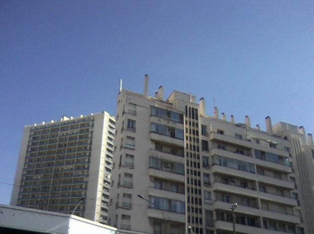 Vue d'immeubles du 143 dans les quartiers Nord de Marseille, depuis le Boulevard de Lesseps (limite entre 3e et 15e arrdt).